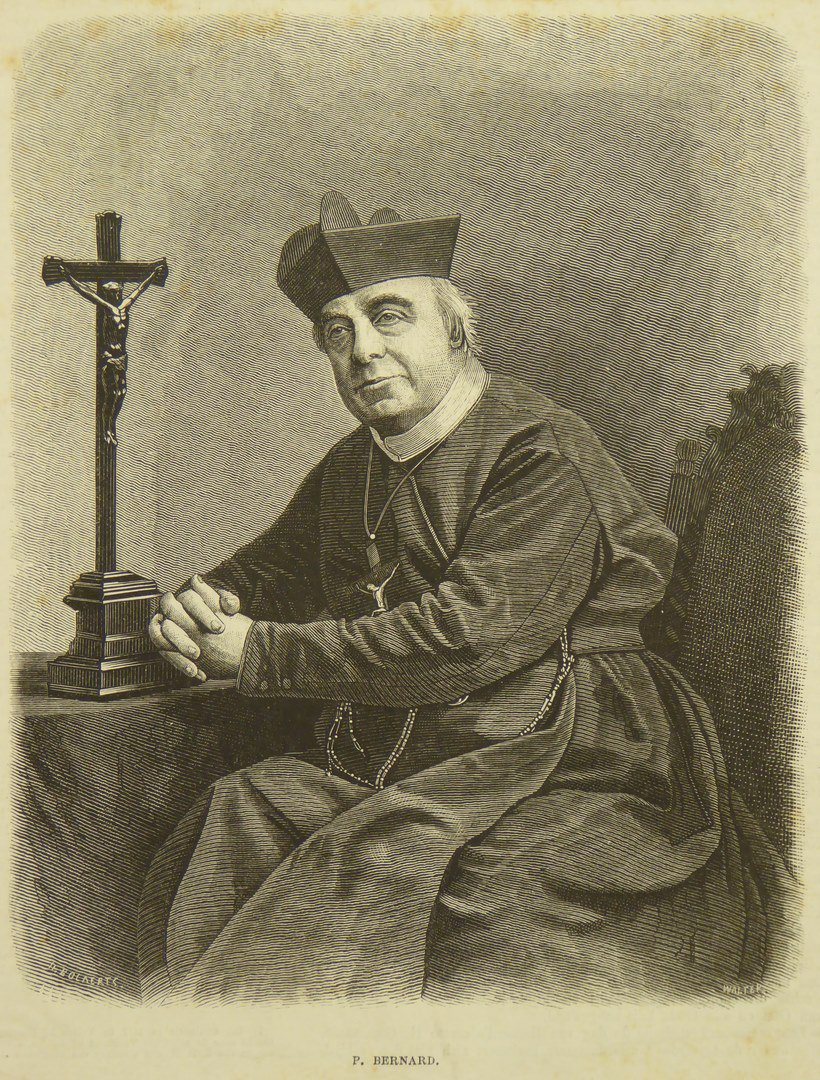 Pater Bernard Hafkenscheidt (1807-1865), gravure J. Walter (coll. Catharijne Convent)